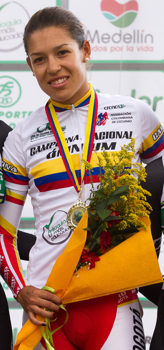 Podio Omnium Damas Oro: Milena Salcedo (Bogotá). Campeonato Nacional de Pista 2013 Velódromo Martín Emilio Cochise (Medellín) Domingo 20 de octubre de 2013